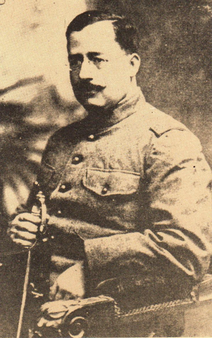 General Salvador Alvarado